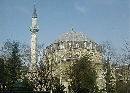 Pertev Paşa veya bilinen adıyla Yeni Cuma Cami...